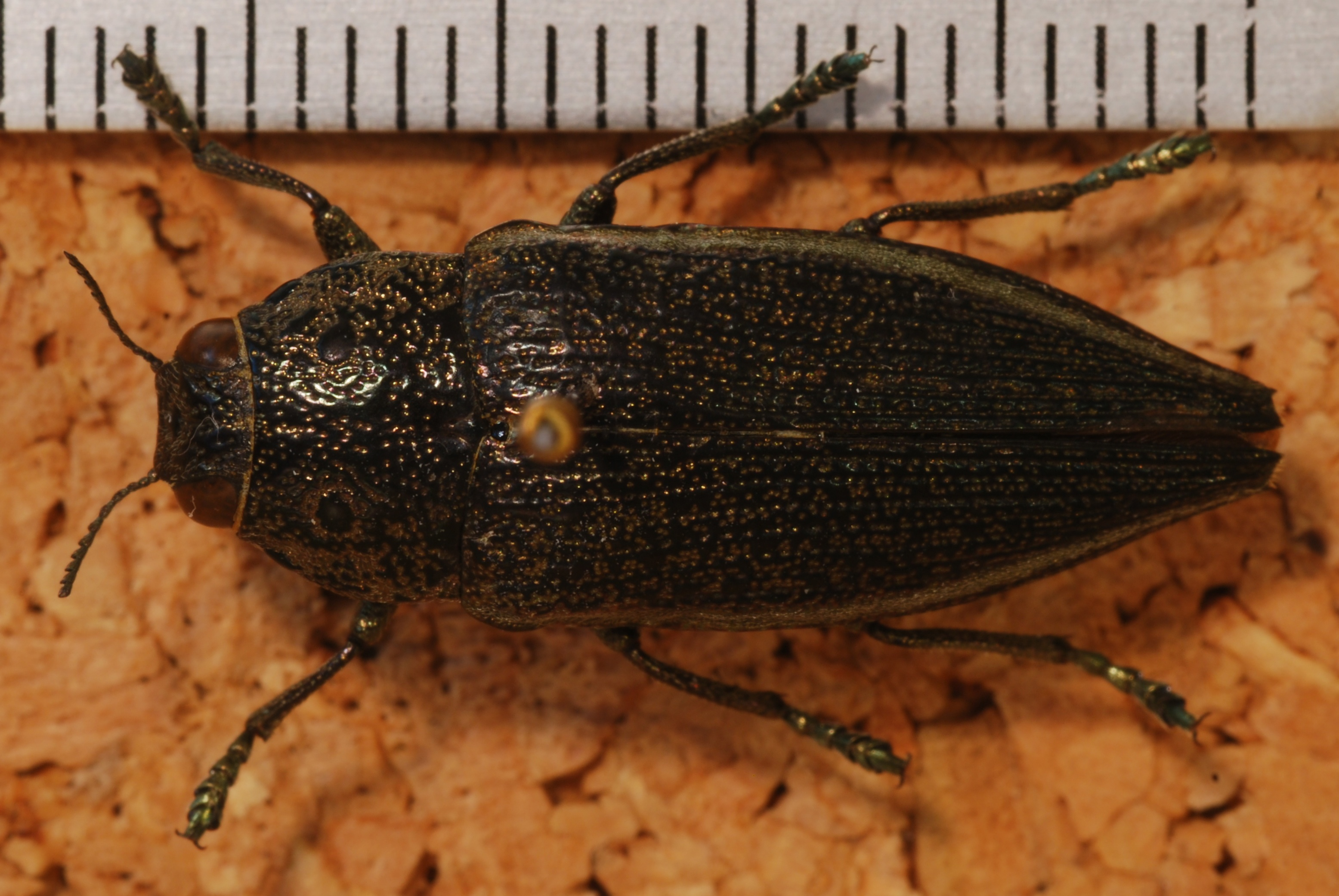 La Comoe, IVORY COAST